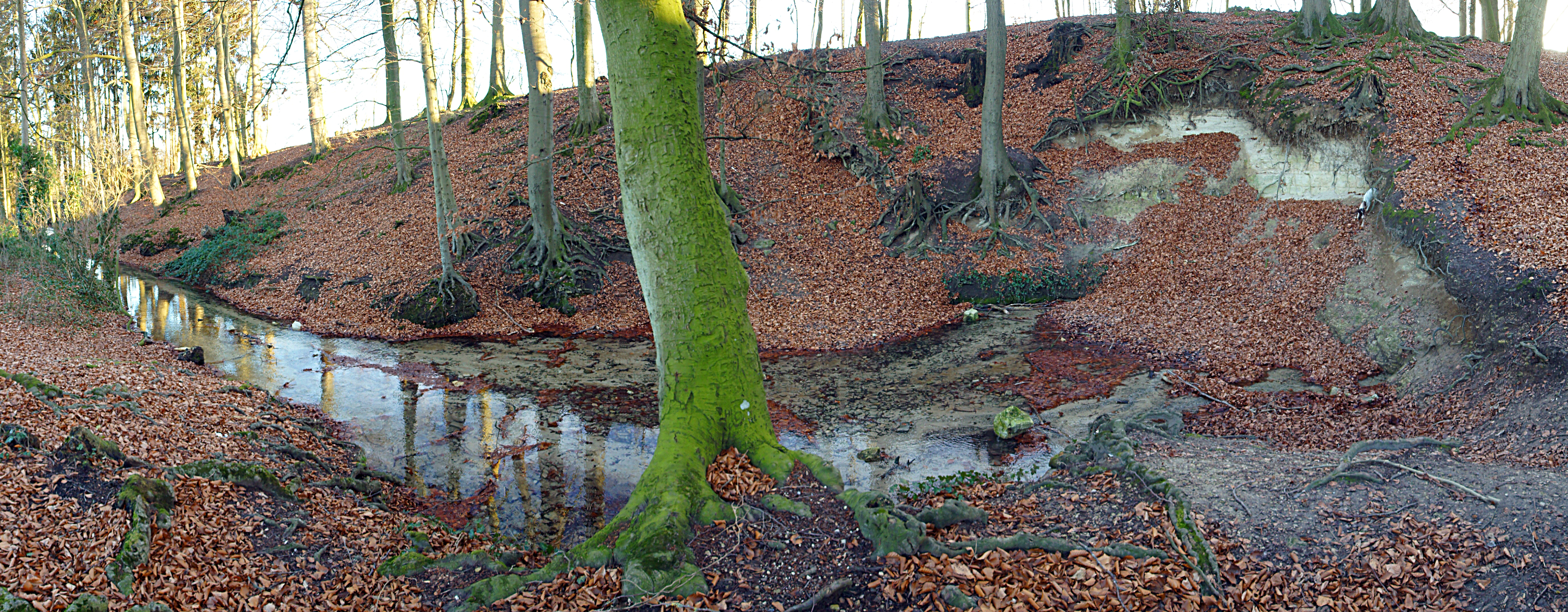 Die Quelle des Leerbaches bei Leer am Fuß des Schöppinger Berges ist ein bedeutendes Naturdenkmal im Münsterland. Beim Schöppinger Berg liegen auf den aus Tonmergel bestehenden wasserundurchlässigen „Osterwicker Schichten“ des Untercampans kluftige Kalksand- und Kalkmergelsteinen der „Coesfelder Schichten“ des Obercampans auf. Das Wasser durchdringt die oberen Lagen und staut sich auf den muldenförmig gebogenen Osterwicker Schichten. Auf einem Quellhorizont in Höhe von etwa 85 m über NHN tritt das Wasser in mehreren Quellen, von denen die Leerbachquelle mit einer Schüttung zwischen 25 und 100 Liter pro Sekunde die ergiebigste ist, aus dem Berg. Der Quelltopf misst 8 bis 10 m im Durchmessser und weist bis zu 14 Wasseraustrittsstellen auf. Das Quellwasser hat eine im Jahresverlauf nur wenig schwankende Temperatur zwischen 8° und 11° C. Durch die konstanten Bedingungen hat sich im Quellbereich eine spezielle Flora und Fauna entwickelt. Die Absperrungen um das Biotop sollten respektiert werden.